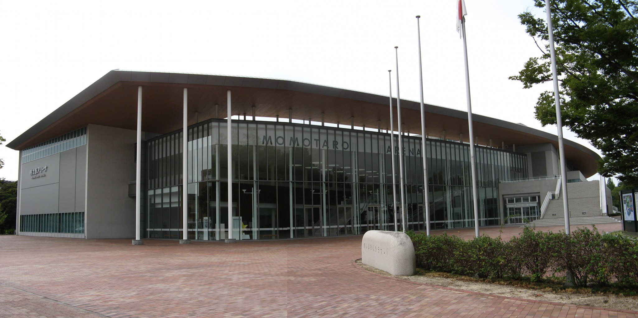 北東方向から見た桃太郎アリーナ。(写真3枚合成)